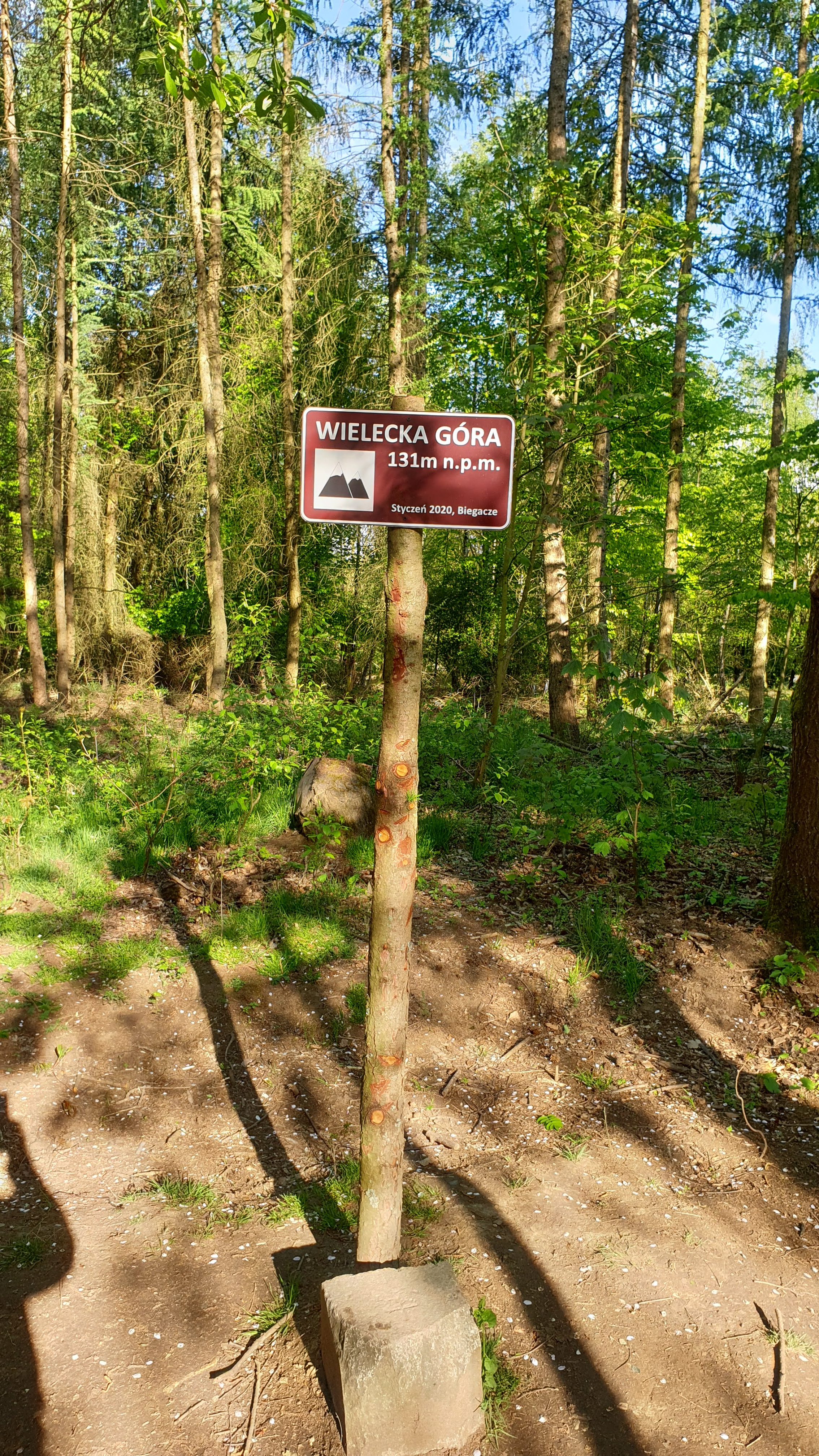 Nowa tablica na wzgórzu Wielecka Góra